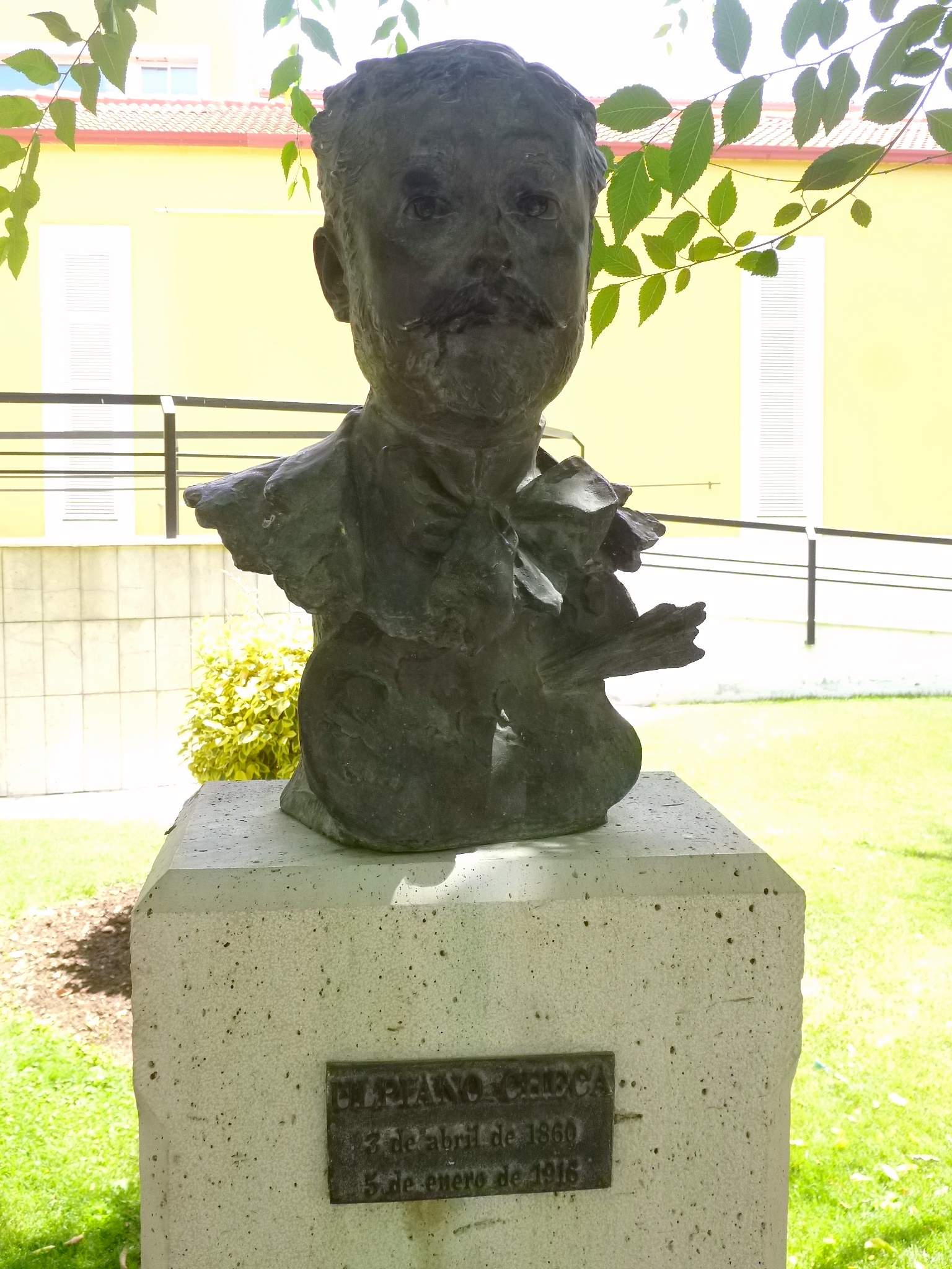 Colmenar de Oreja (Comunidad de Madrid)